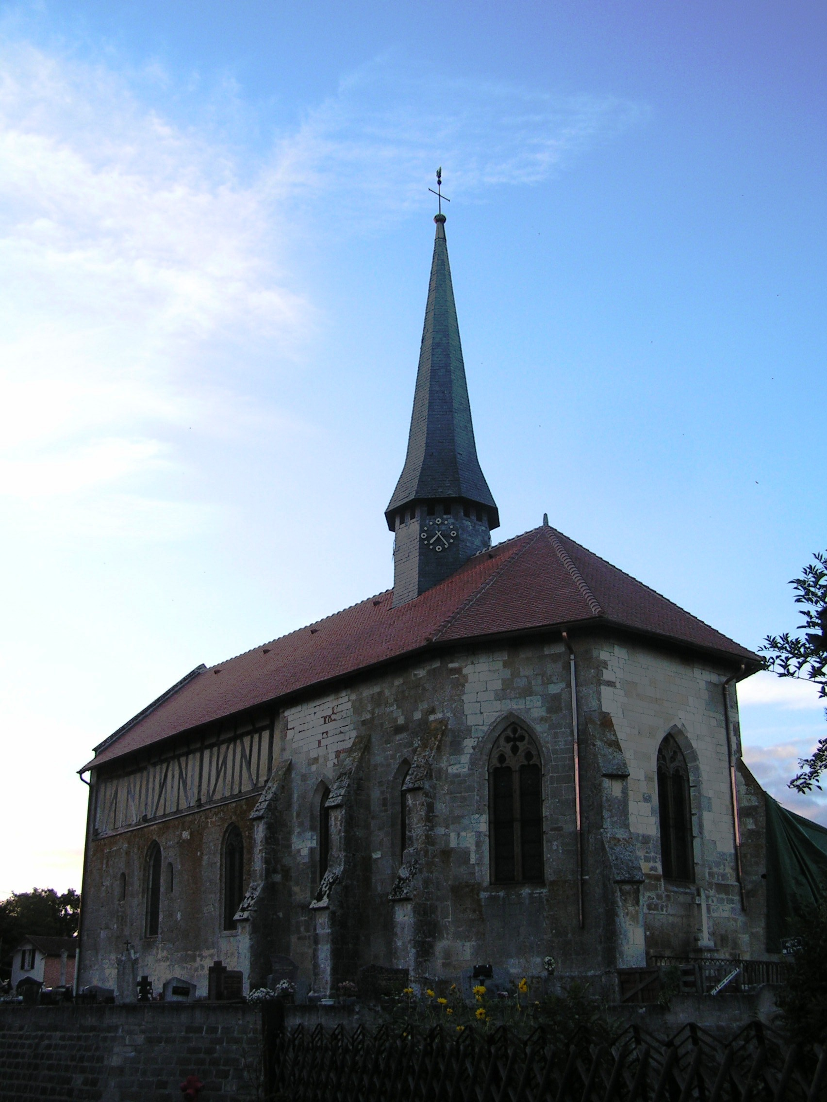 Église Saint-Hilaire d'Écriennes (Classé) .